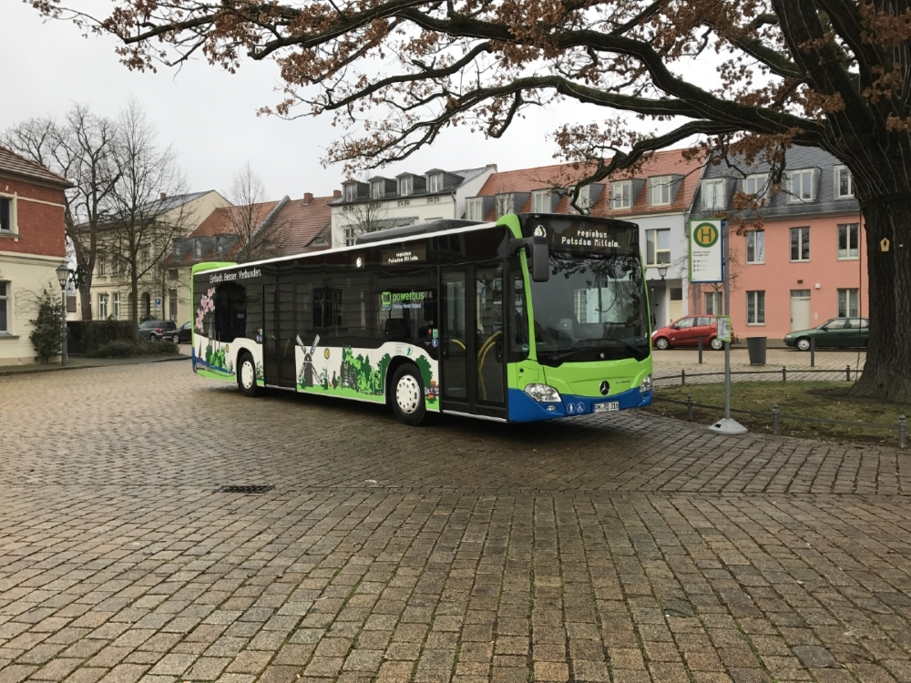 Der Mercedes-Benz Citaro C2 der regiobus Potsdam Mittelmark in Werder Havel.